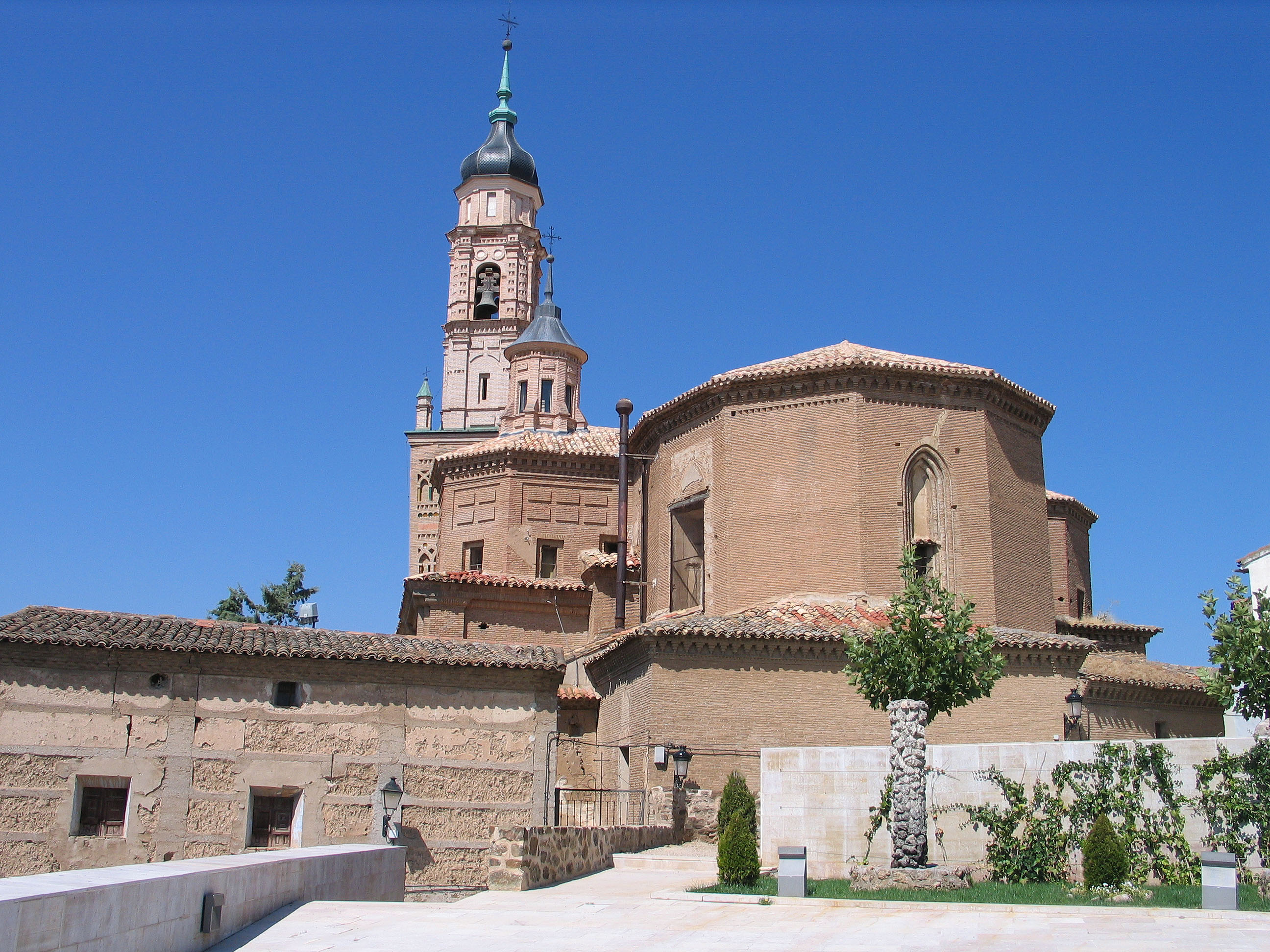 Ateca, Iglesia de Santa María y San Francisco